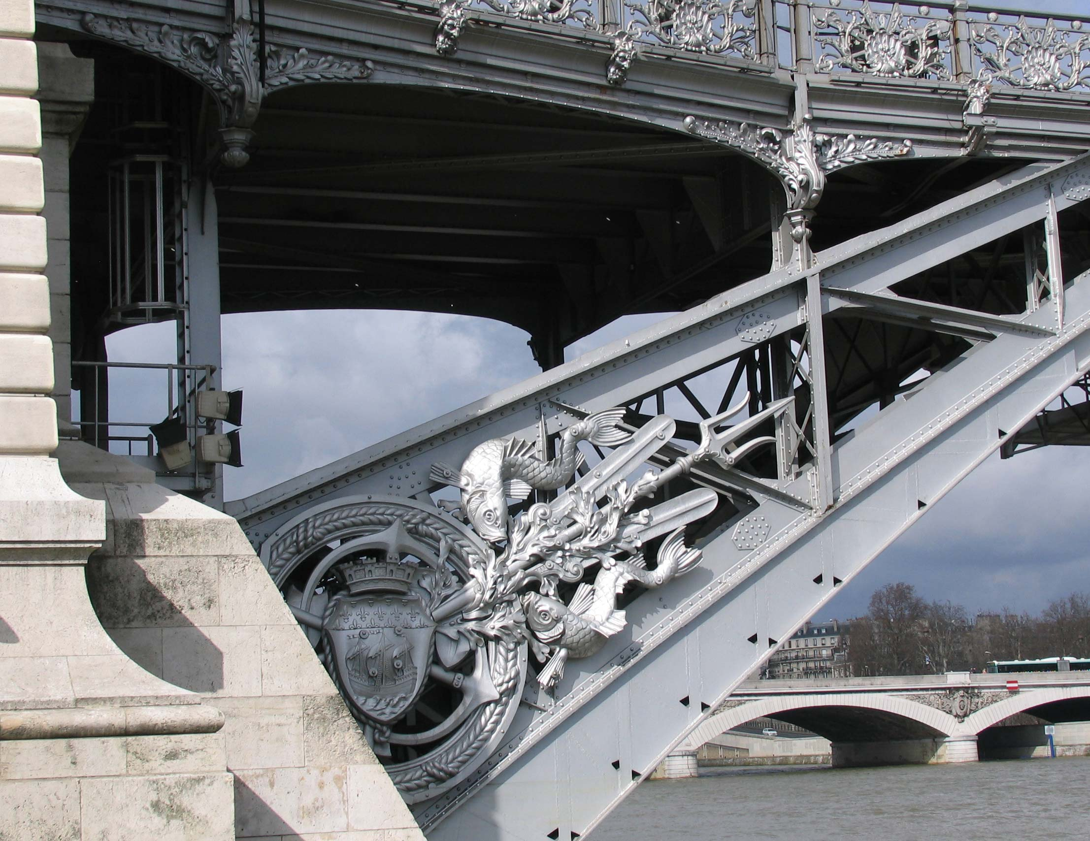 Viaduc d'Austerlitz à Paris (détail) Lieu : Paris, France Date : 2006 Auteur : photo personnelle